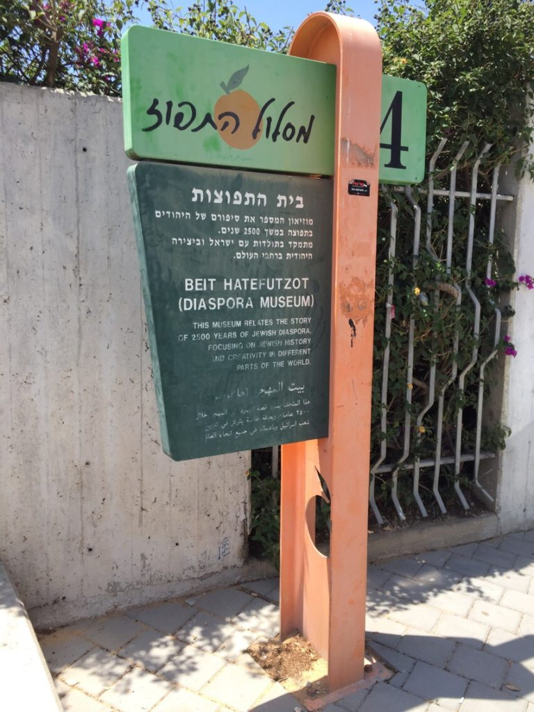 מסלול התפוז